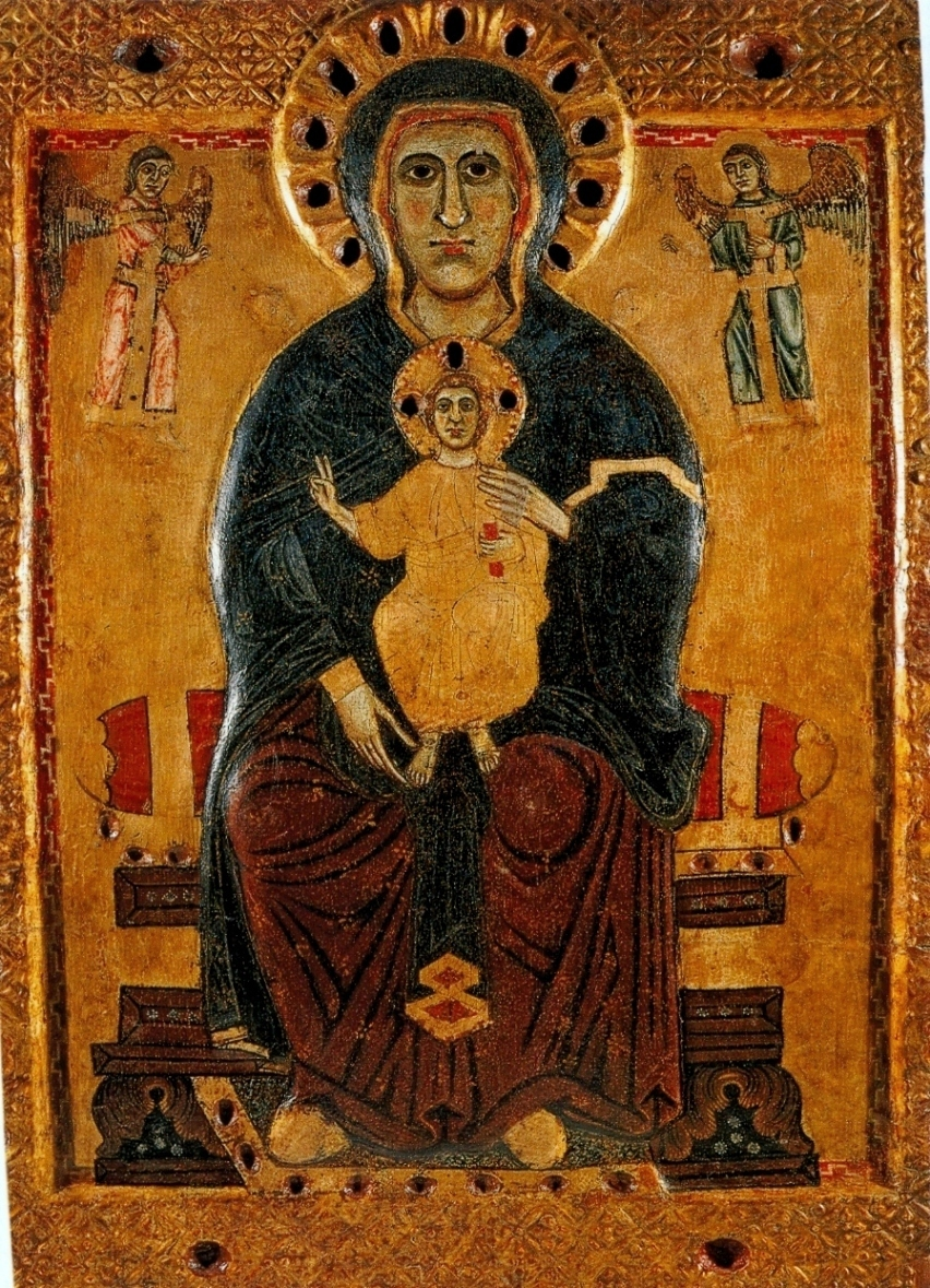 Maestro di Tressa; Madonna_with_child. Museo dell'Opera del Duomo di Siena. 1250s